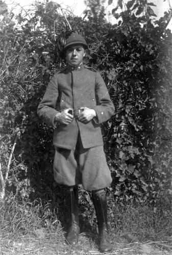 Paolo Carlo Parodi integrante do 13º Regimento da 6ª Brigada Bersaglieri, em foto tirada no ano de 1918. De origem genovesa, entrou no conflito forjando a idade mínima permitida (18 anos), quando tinha apenas 16 anos. Foi condecorado diversas vezes durante a Primeira Guerra Mundial, por atos de bravura e em decorrência de ferimentos em combate, feitos que lhe renderam o posto de Capitão antes de completar 20 anos.